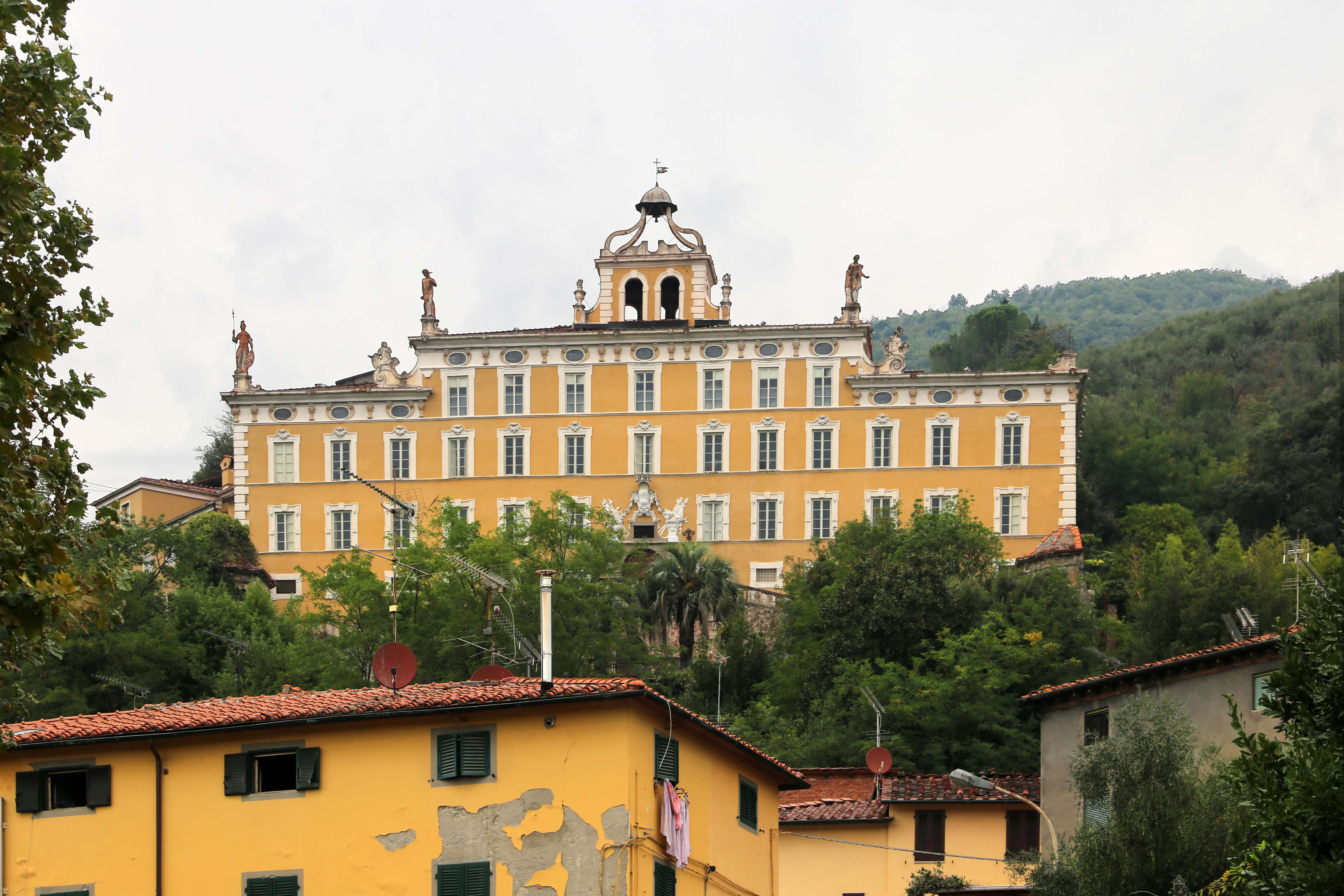 Giardino di Villa Garzoni This is a photo of a monument which is part of cultural heritage of Italy.